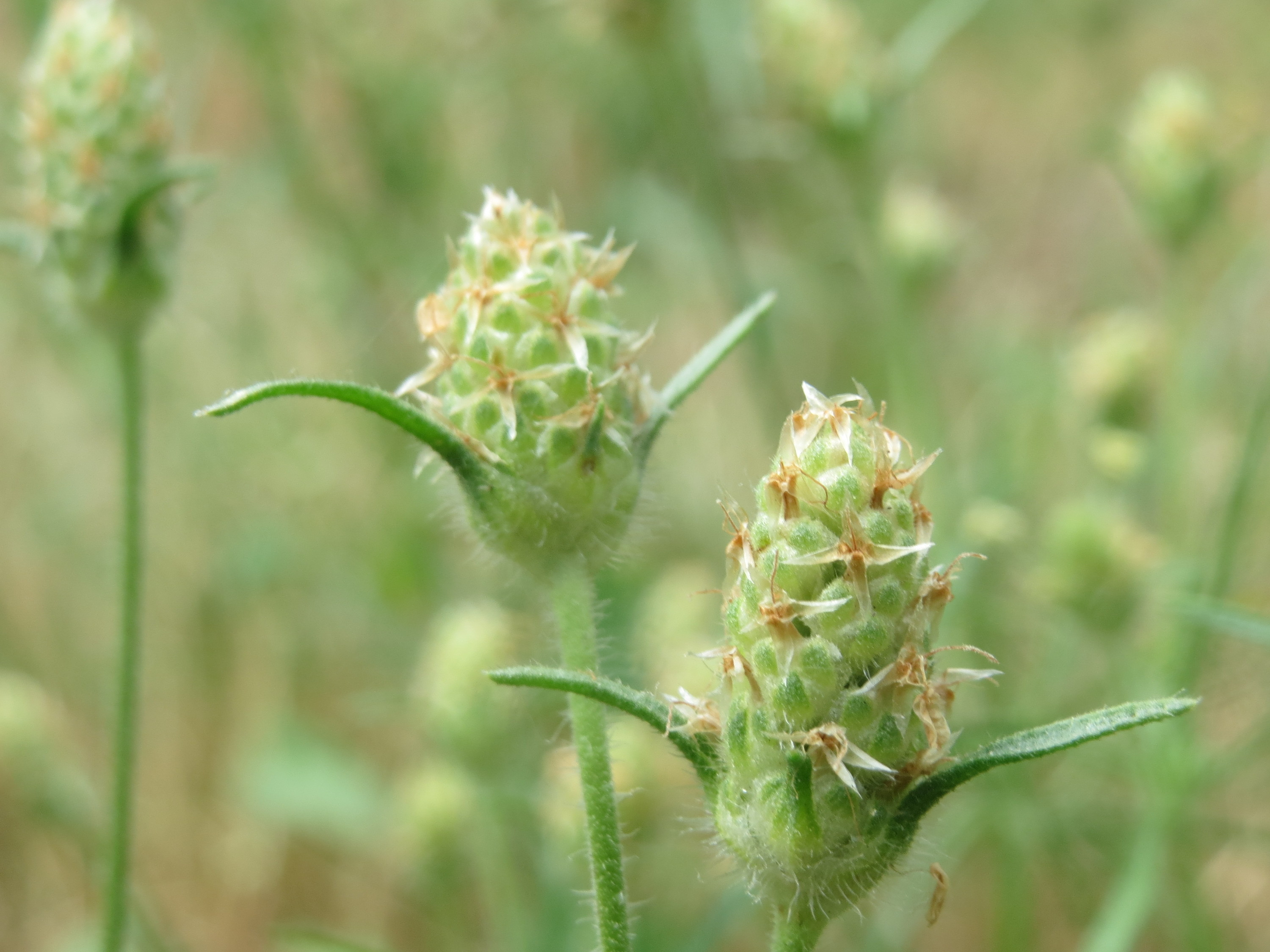 Sand-Wegerich (Plantago arenaria) in Hockenheim